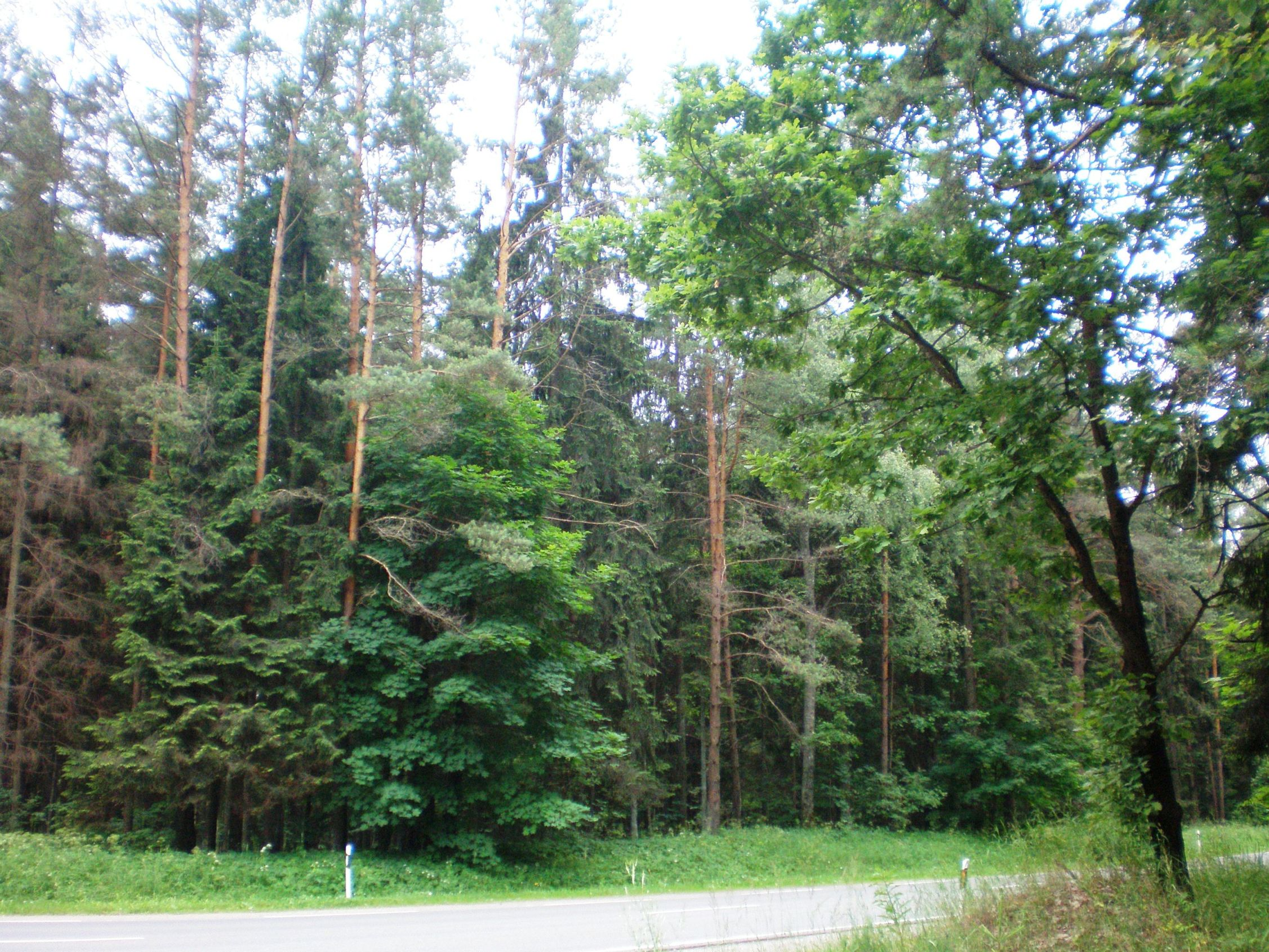 Kazlų Rūdos miškai už Užbalių